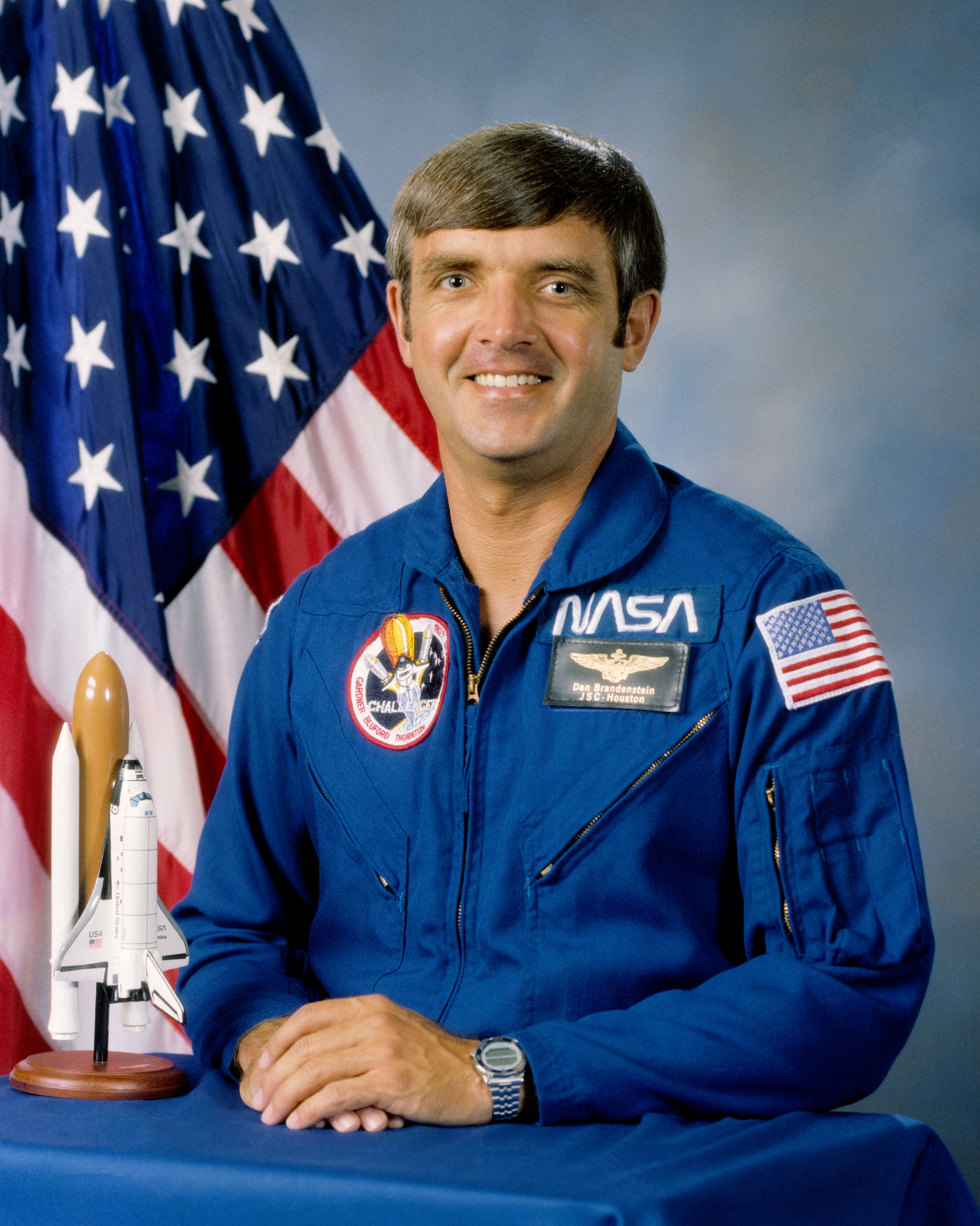 portrait astronaut Daniel Brandenstein